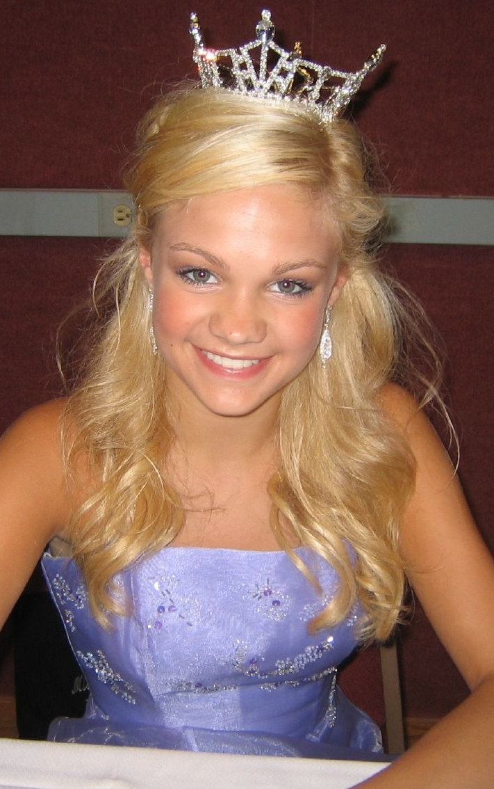 Allie Rick, Miss Wisconsin's Outstanding Teen 2006